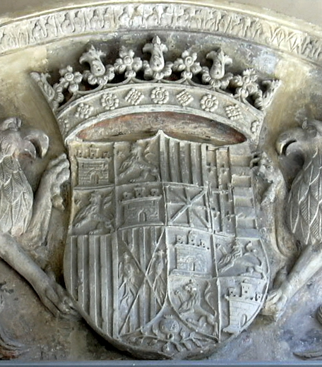 La Aljafería - Dintel. Descripción de este emblema en Faustino Menéndez Pidal de Navascués, «"Tanto monta". El escudo de los Reyes Católicos», en Luis Suárez Fernández, Isabel la Católica vista desde la Academia, Real Academia de la Historia de España, (Estudios, 16), 2005, pág. 123: «En estos territorios [Corona de Aragón], las composiciones armeras eran más flexibles. En Aragón y Cataluña Fernando el Católico usó [...] los palos solos de Aragón, un partido del cuartelado de Castilla-León y de Aragón, a veces en el orden inverso, y en la última época un terciado: 1. Aragón-Sicilia; 2, Aragón; 3, terciado también de Hungría, Anjou-Nápoles y Jerusalén. Finalmente, en Nápoles usó primero, viviendo doña Isabel, un cuartelado: 1,4, contracuartelado de Castilla y León; 2, Aragón partido de Jerusalén partido de Hungría; 3, Aragón partido de Aragón-Sicilia (hay variantes de estas armas). Más tarde, ya viudo, cuartela simplemente Aragón y el terciado de Hungría, Anjou y Jerusalén, timbrándolo a veces con el yelmo coronado y la cimera aragonesa. Las anexiones de Nápoles y de Navarra habían aportado la última modificación en las armas del Rey Católico. Manteniendo los cuarteles 1, 3 y 4 y el entado en punta de Granada, el 2 se cambia por un partido: 1, Aragón cortado de Navarra; 2, Jerusalén partido de Hungría. Así aparece, sostenido por dos grifos, soporte aragonés, y timbrado por una corona en un tímpano del castillo de la Aljafería.»